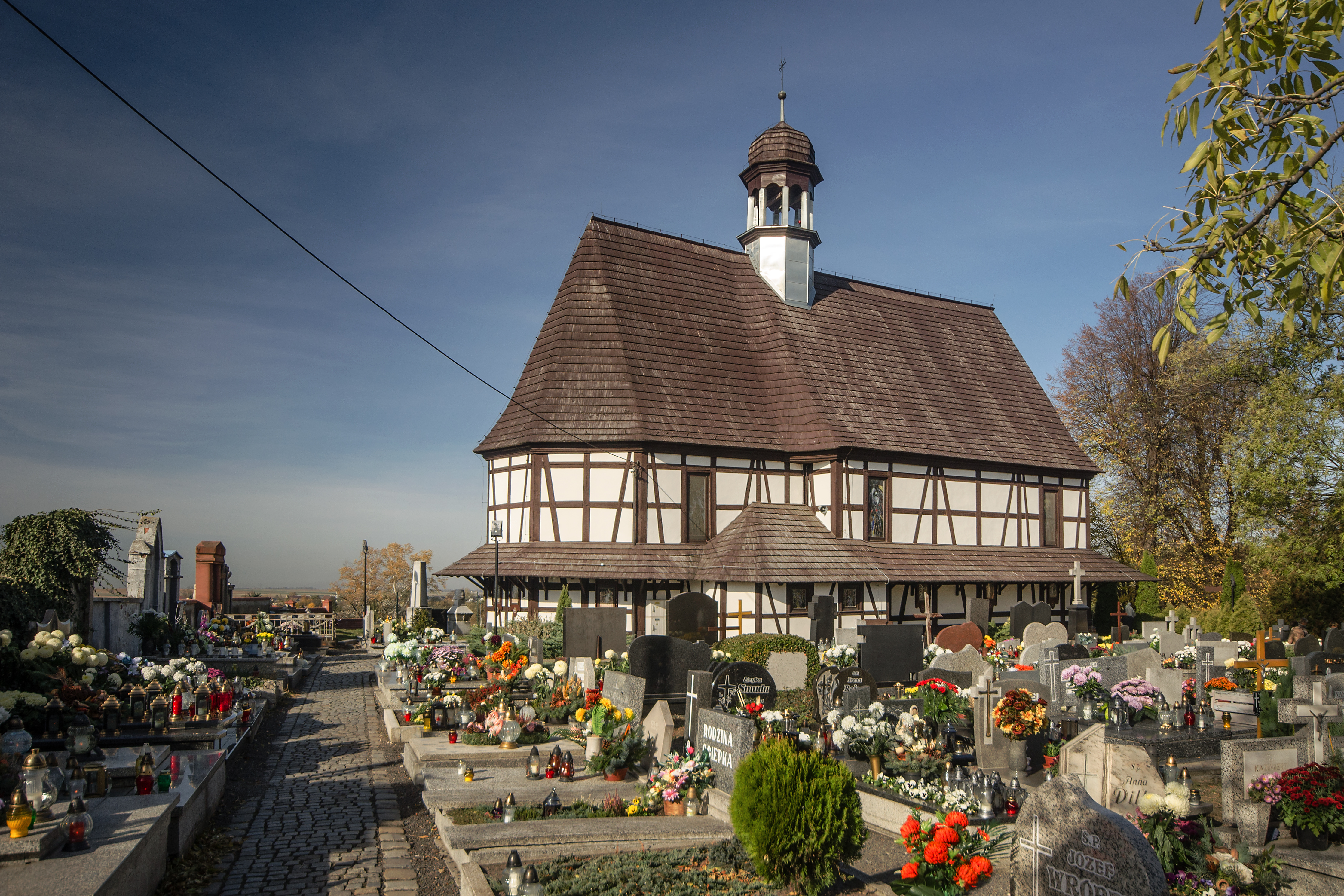 Głogówek, kościół cmentarny pw. Św. Krzyża, 1705